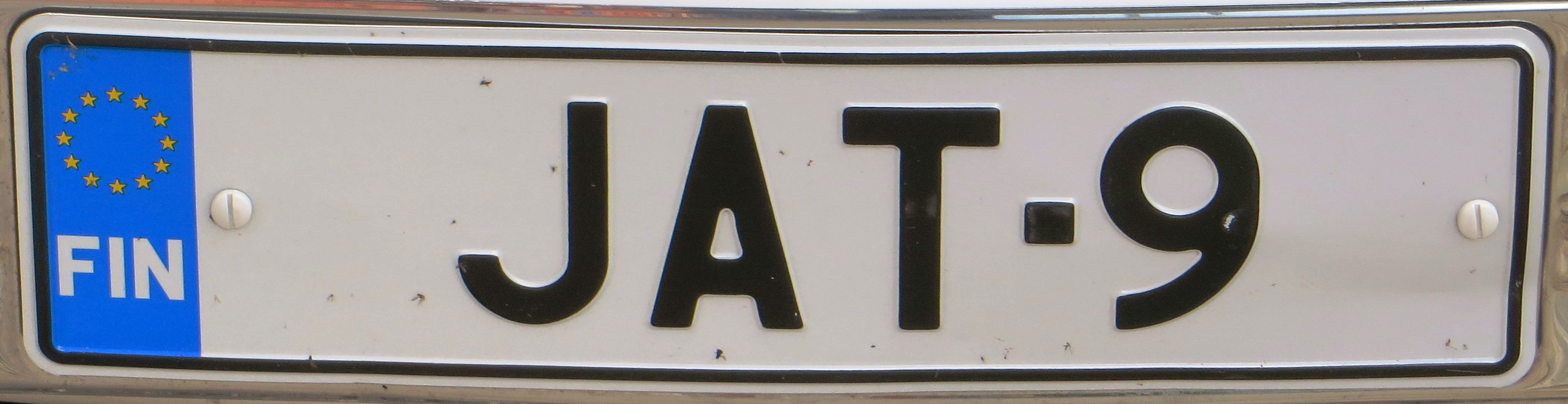 persoonlijke Finse kentekenplaat